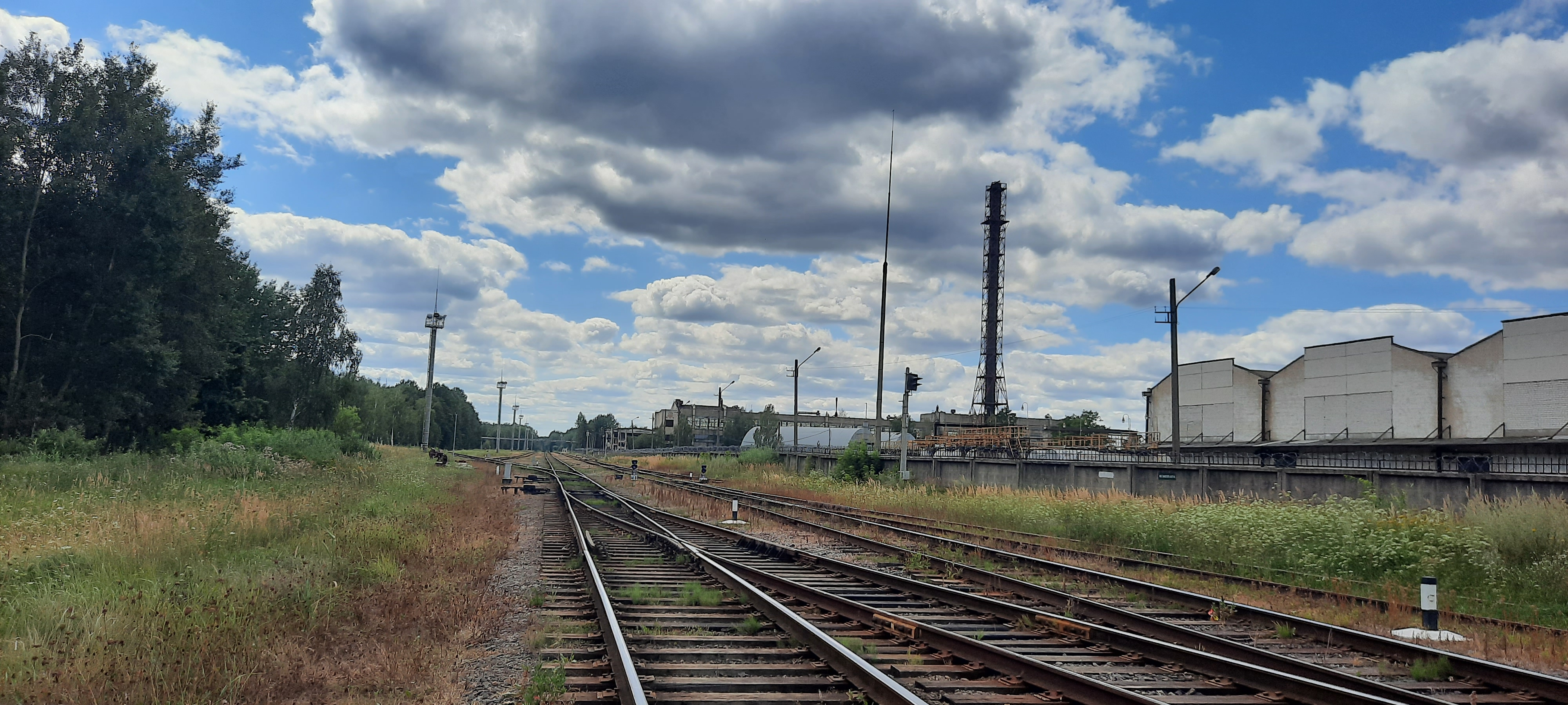 Станцыя Корд